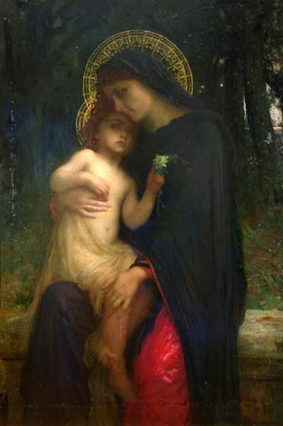 L'addorato